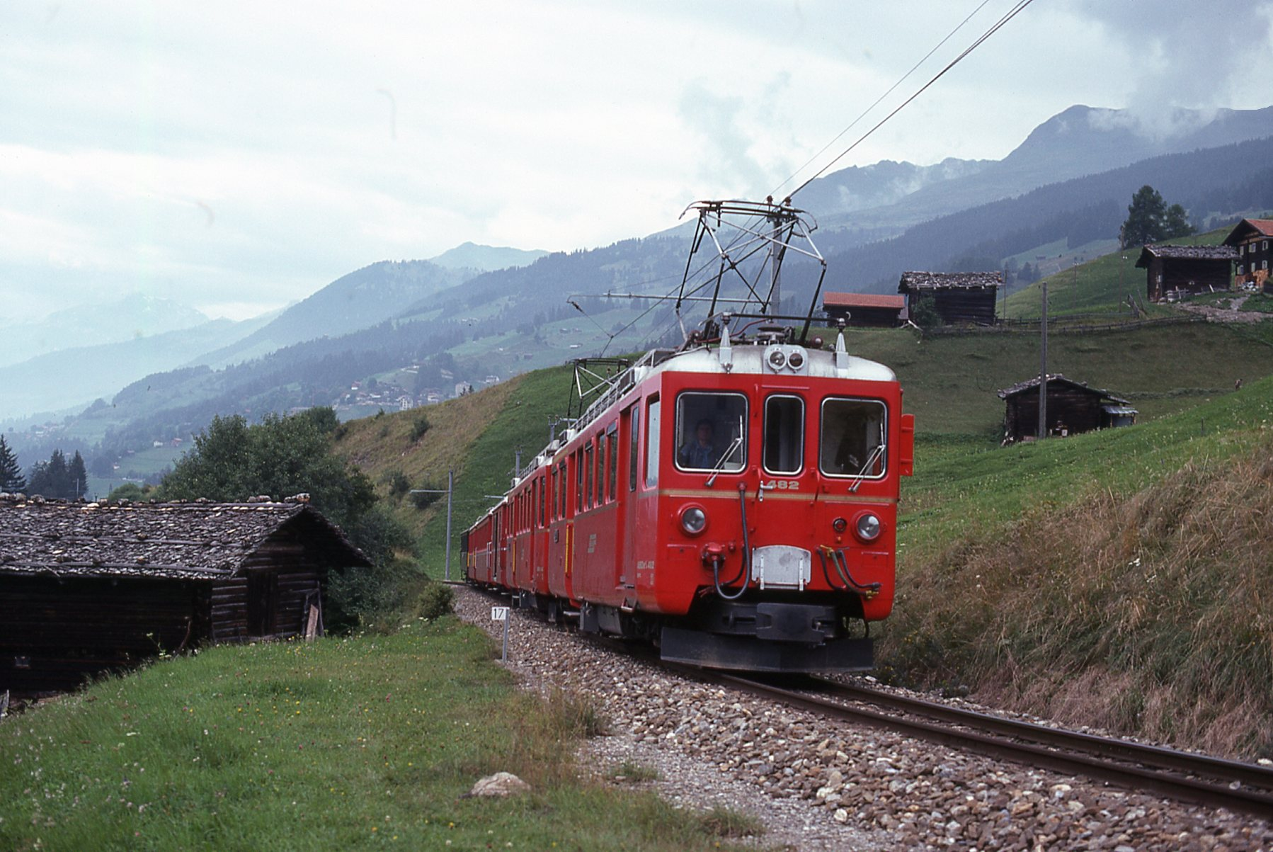 Photo prise dans les années 1980.